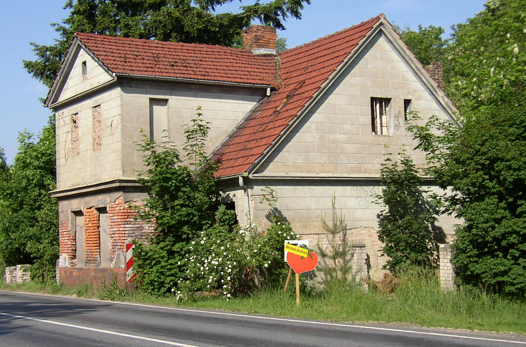 Chausseehaus in Werftpfuhl (ehemals Zollstation von Hirschfelde, jetzt Werneuchen-Hirschfelde) in Brandenburg, Deutschland